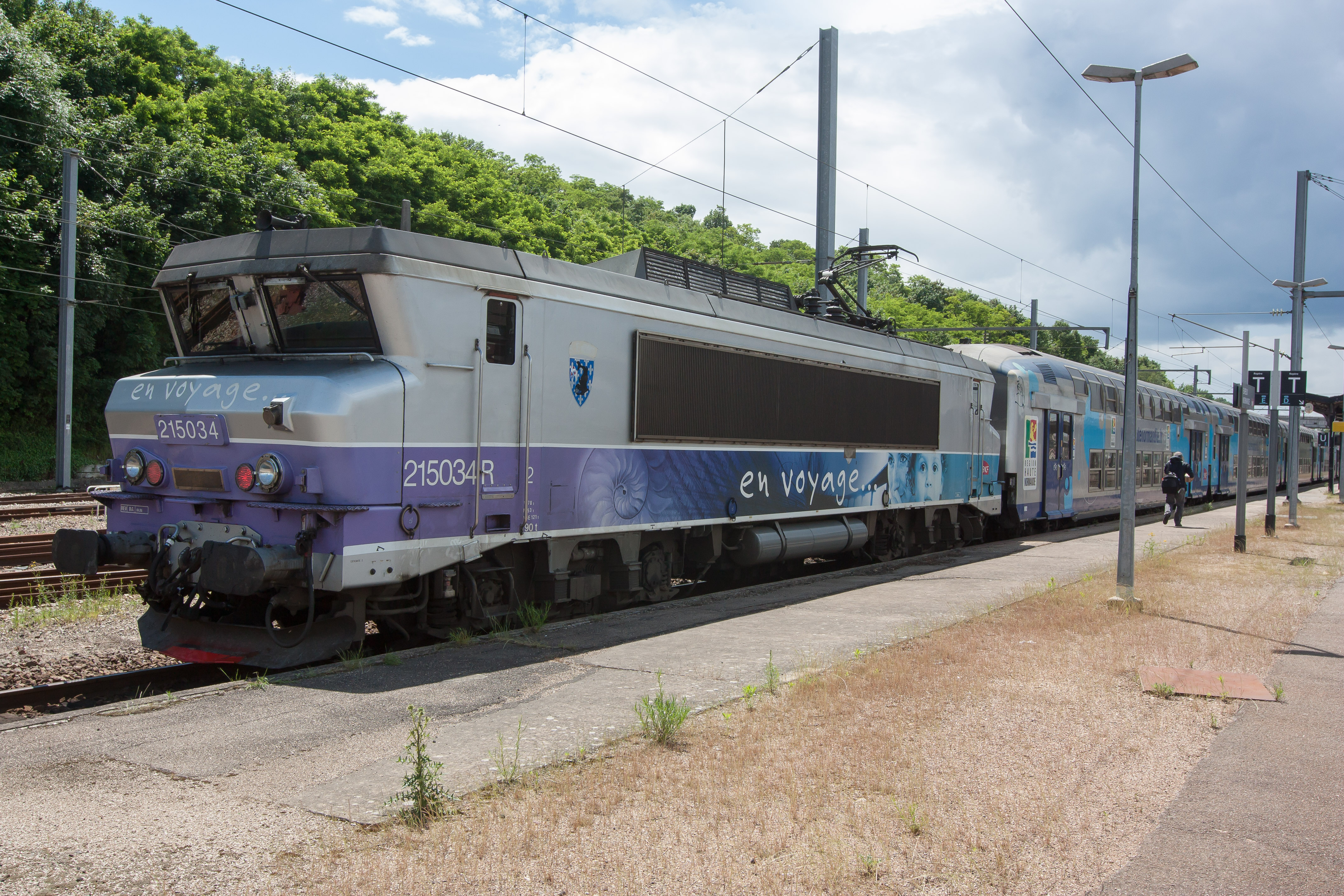 Gare d'Evreux / département de l'Eure / région Normandie / France